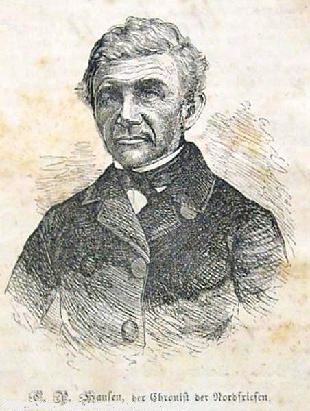 Der Sylter Lehrer und Chronist Christian Peter Hansen (1803-1879)